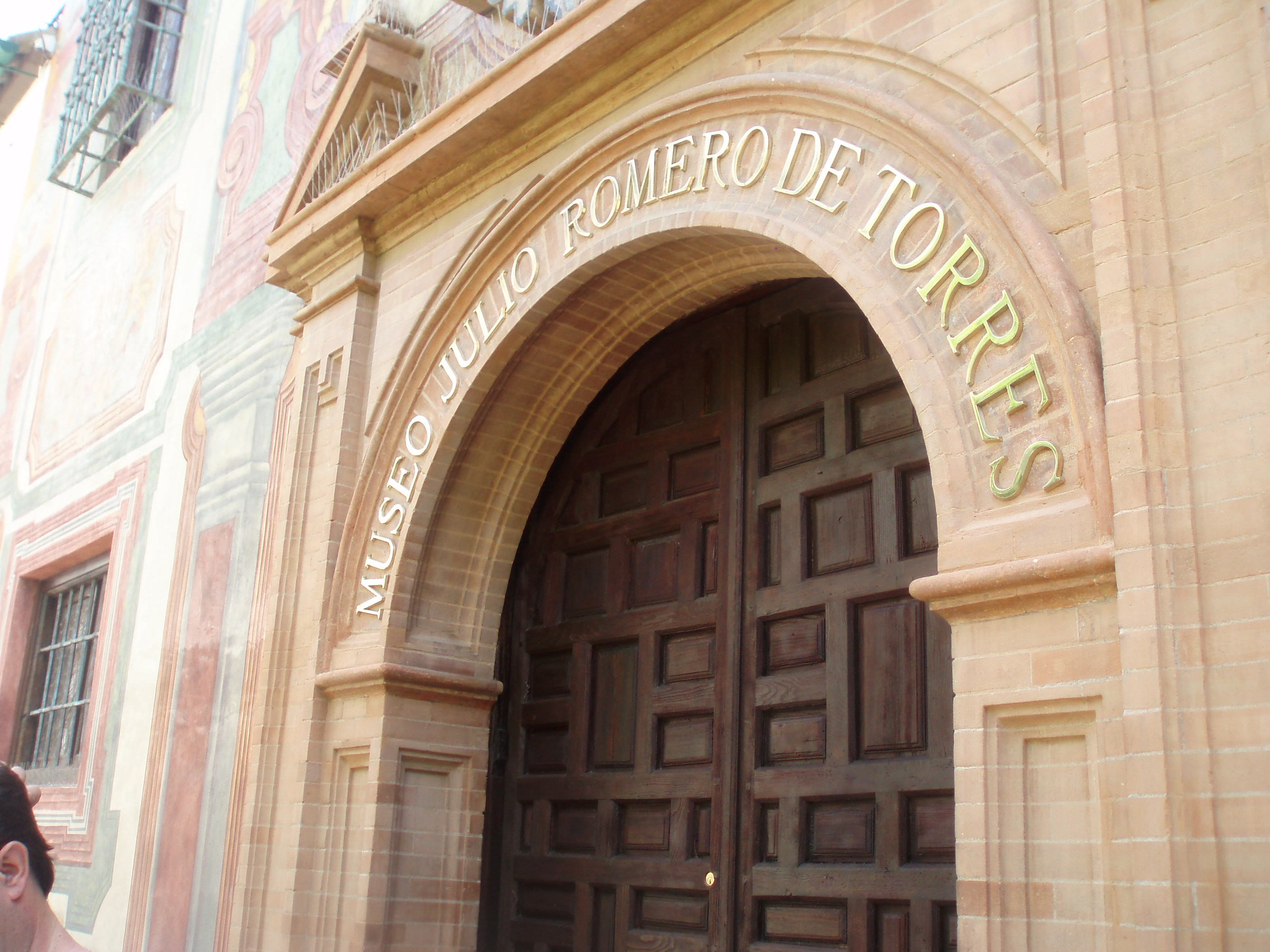 Museo Julio Romero de Torres. Córdoba.